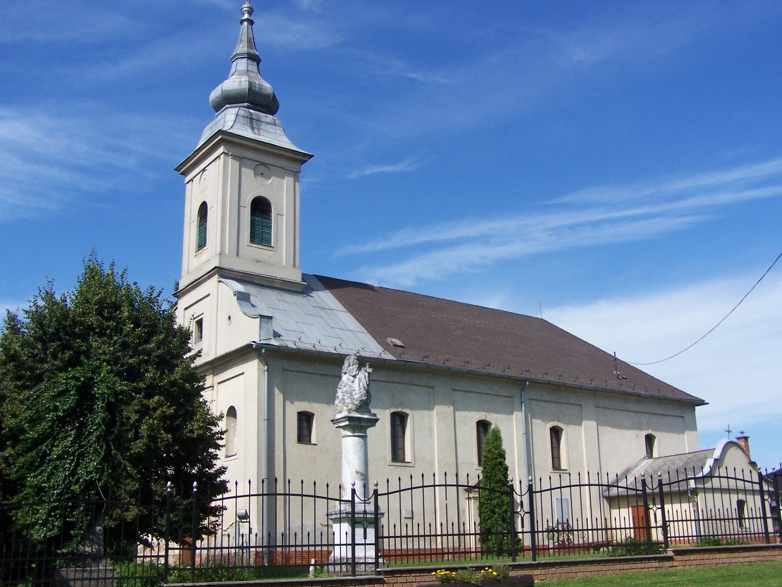 Római katolikus templom (Szent Lőrinc) (Tolmács, Béke tér 11.) This is a photo of a monument in Hungary. Identifier: 6847